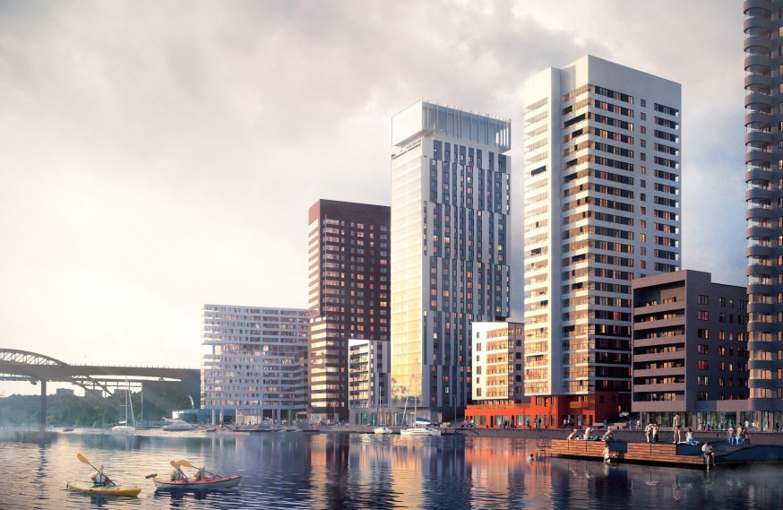 Liljeholmskajen, ett större bostadsprojekt i Stockholm. Från vänster: Brohuset, K7, Kajplats 6, Kajen 5 och Kajen 4